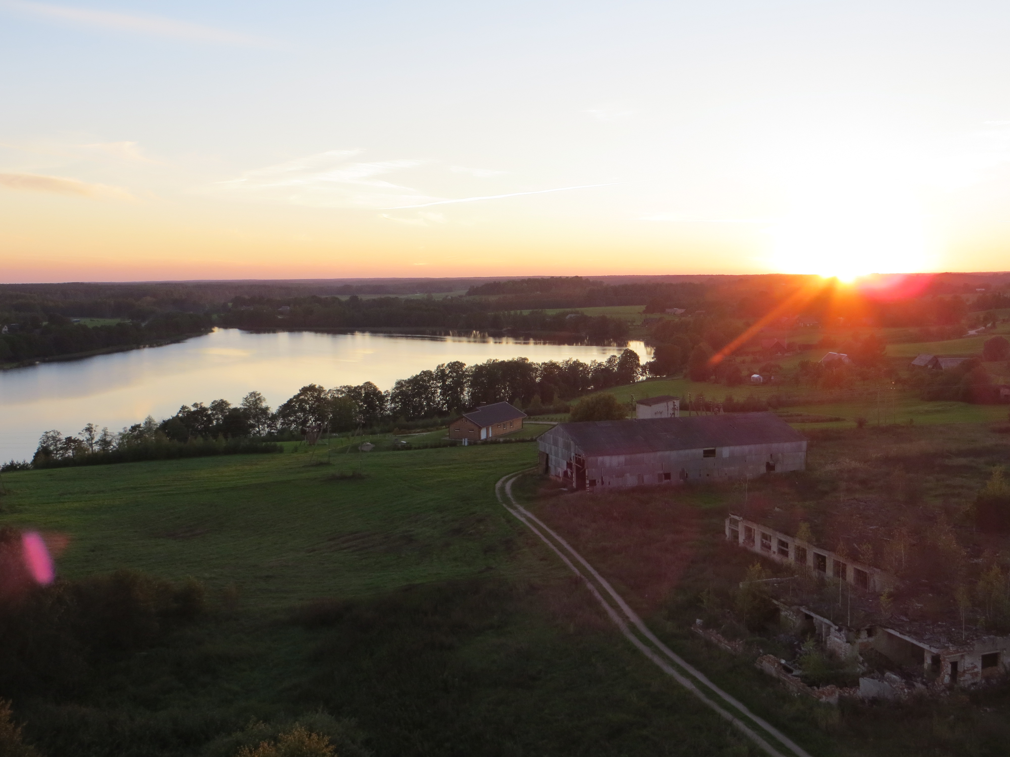 Linkmenys, Lithuania